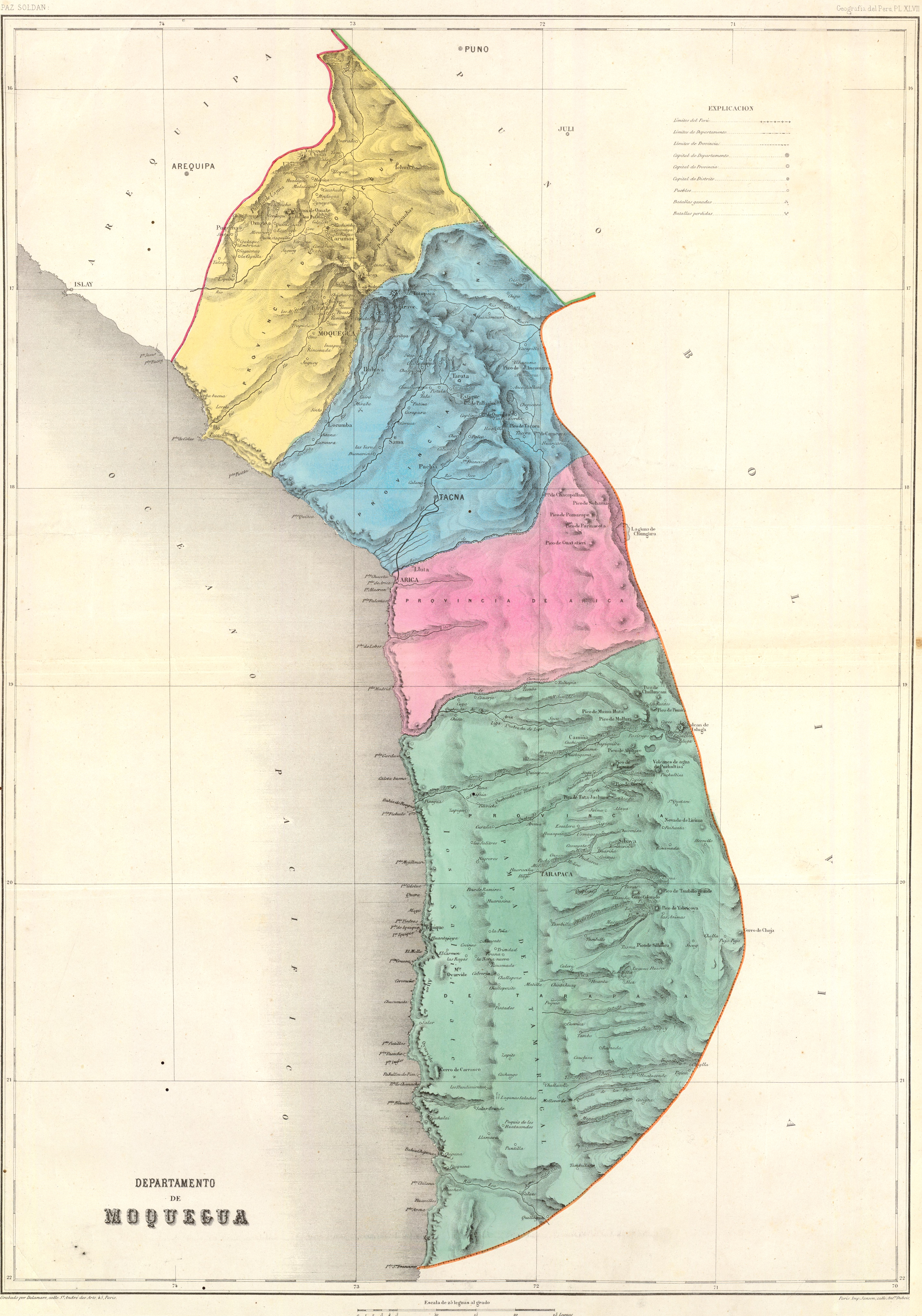 Mapa del antiguo Departamento de Moquegua, hacia 1865. Paz Soldan. Geografia del Peru. Grabado por Delamare, Calle St. Andre des Arts, 45, Paris. Paris, Imp. Janson, Calle Antne. Dubois, 6. (Paris, Libreria de Augusto Durand, 1865)